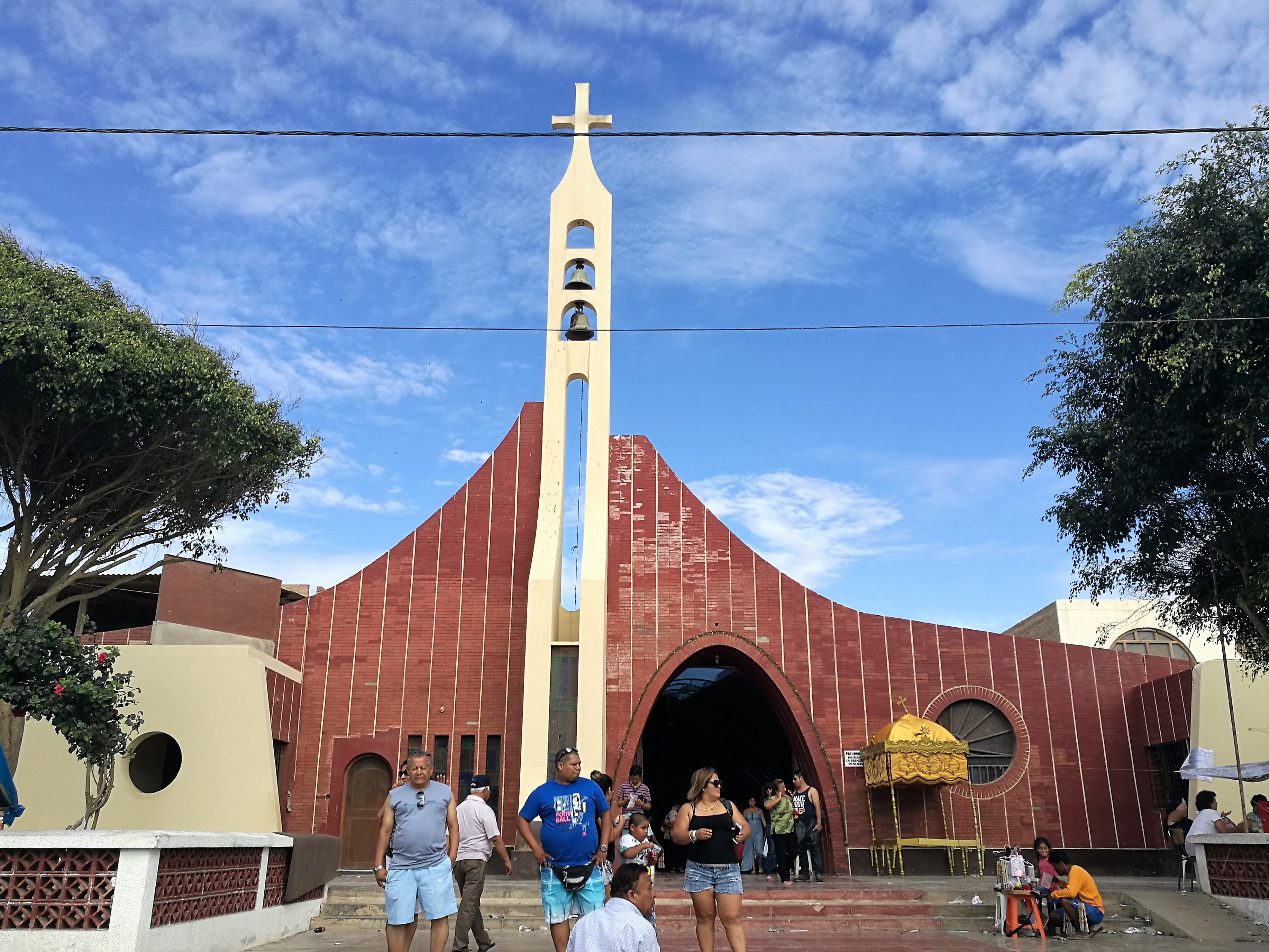 Façana de Santa Maria Magdalena d'Etén